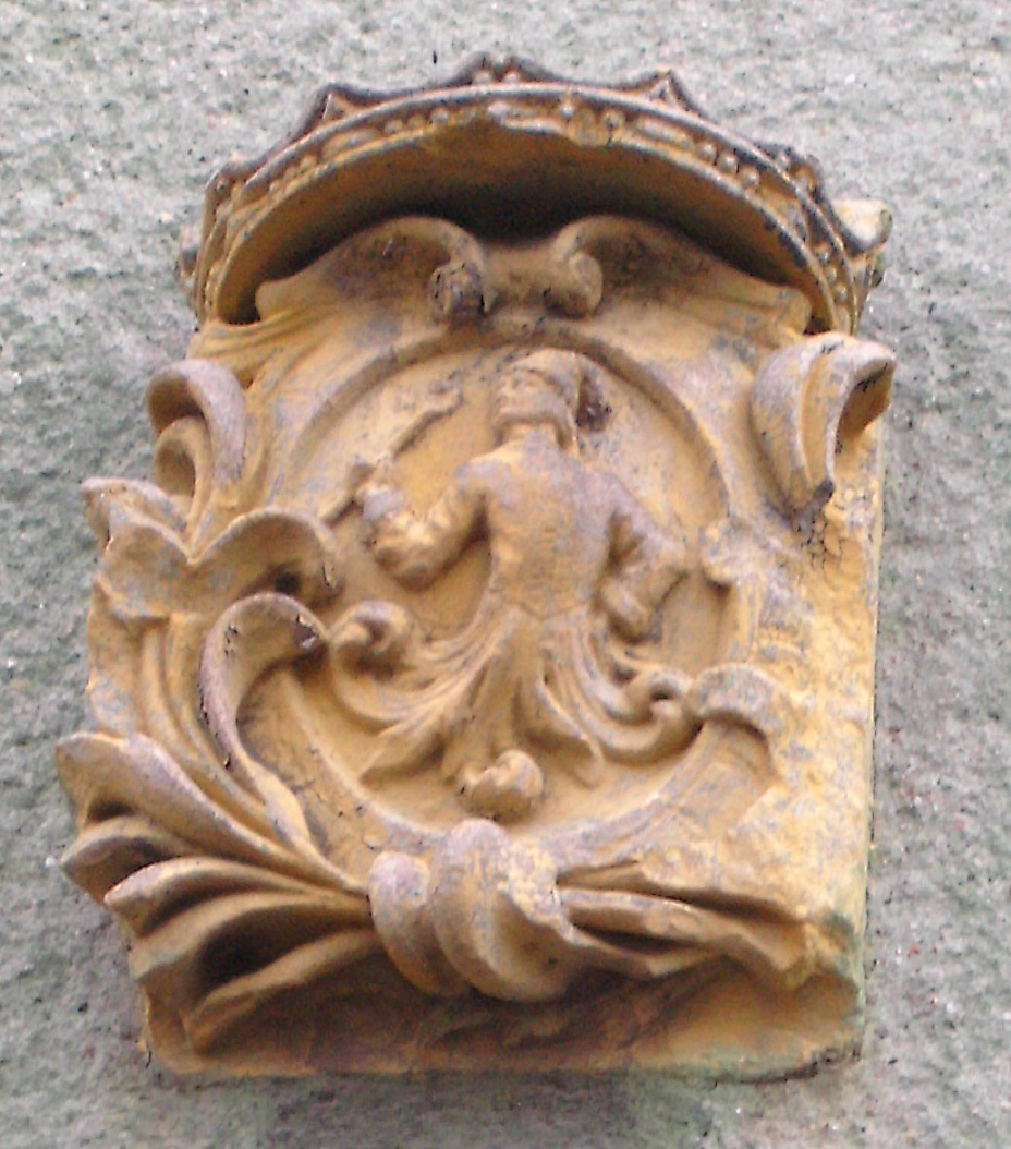 Spolienstein mit Wappen der Ritter von Blumencron in Wattenheim, Pfalz